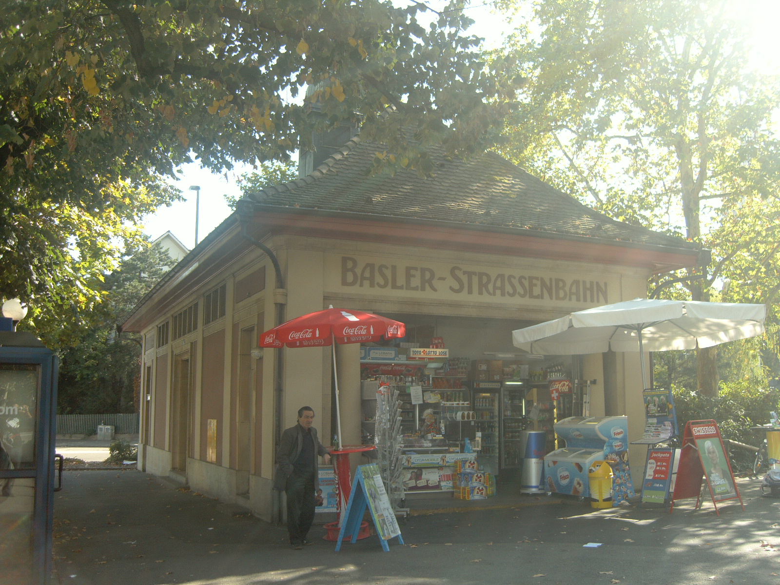 Basler-Strassenbahn Hütte in Kannenfeldplatz